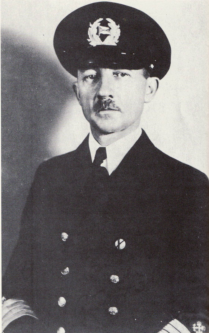 Porträtfotografie des Kapitäns Gustav Schröder.